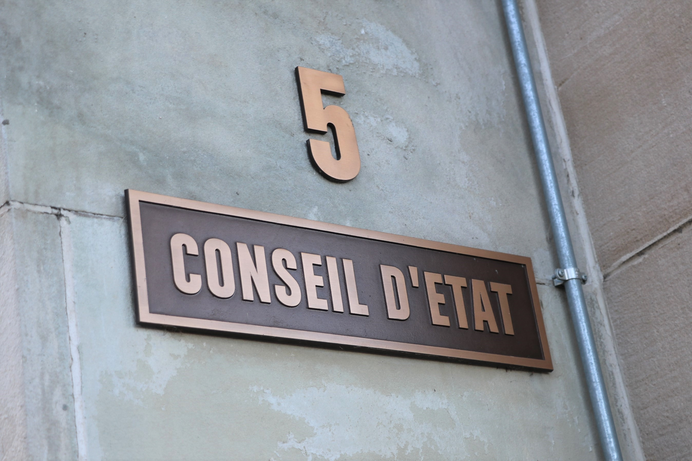 Staatsrot Lëtzebuerg